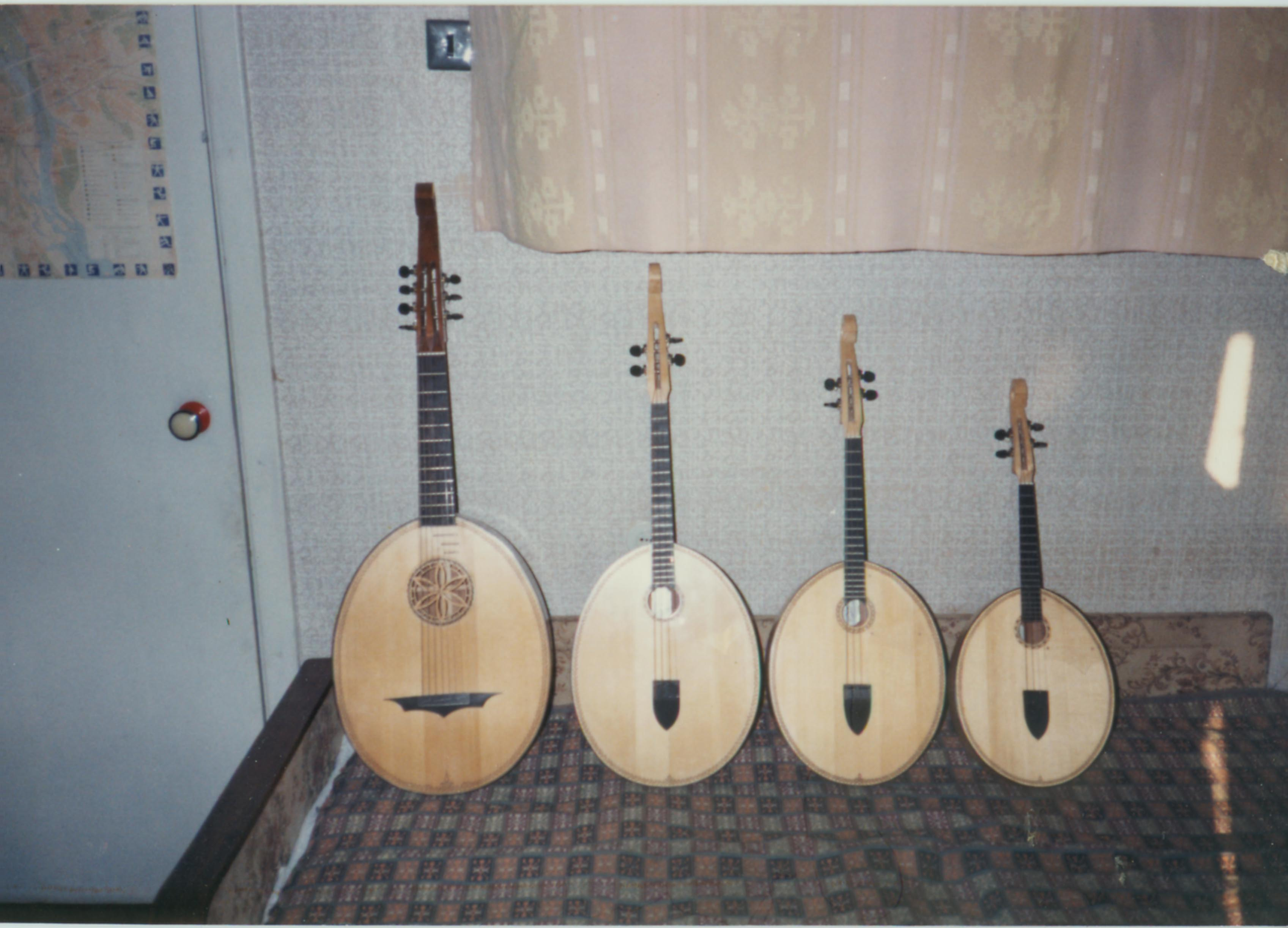 Ukrainian kobzas